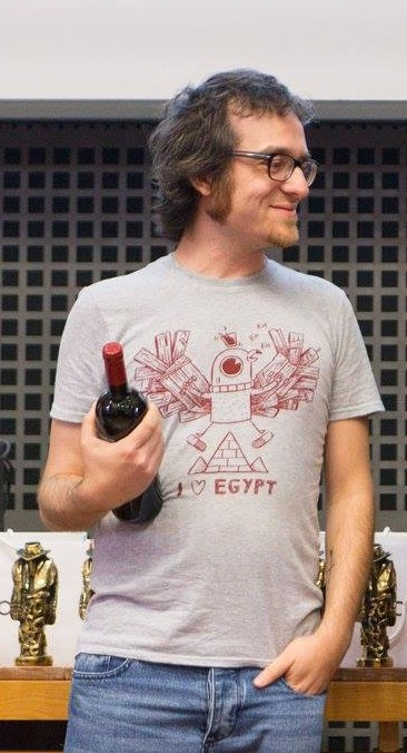 Mia produzione